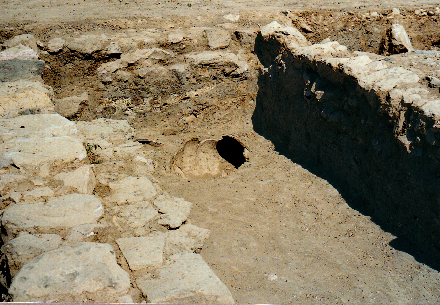 Kültepe-Kanes, bronzezeitlicher Fundort in der Zentraltürkei, Unterstadt-Karum Grab